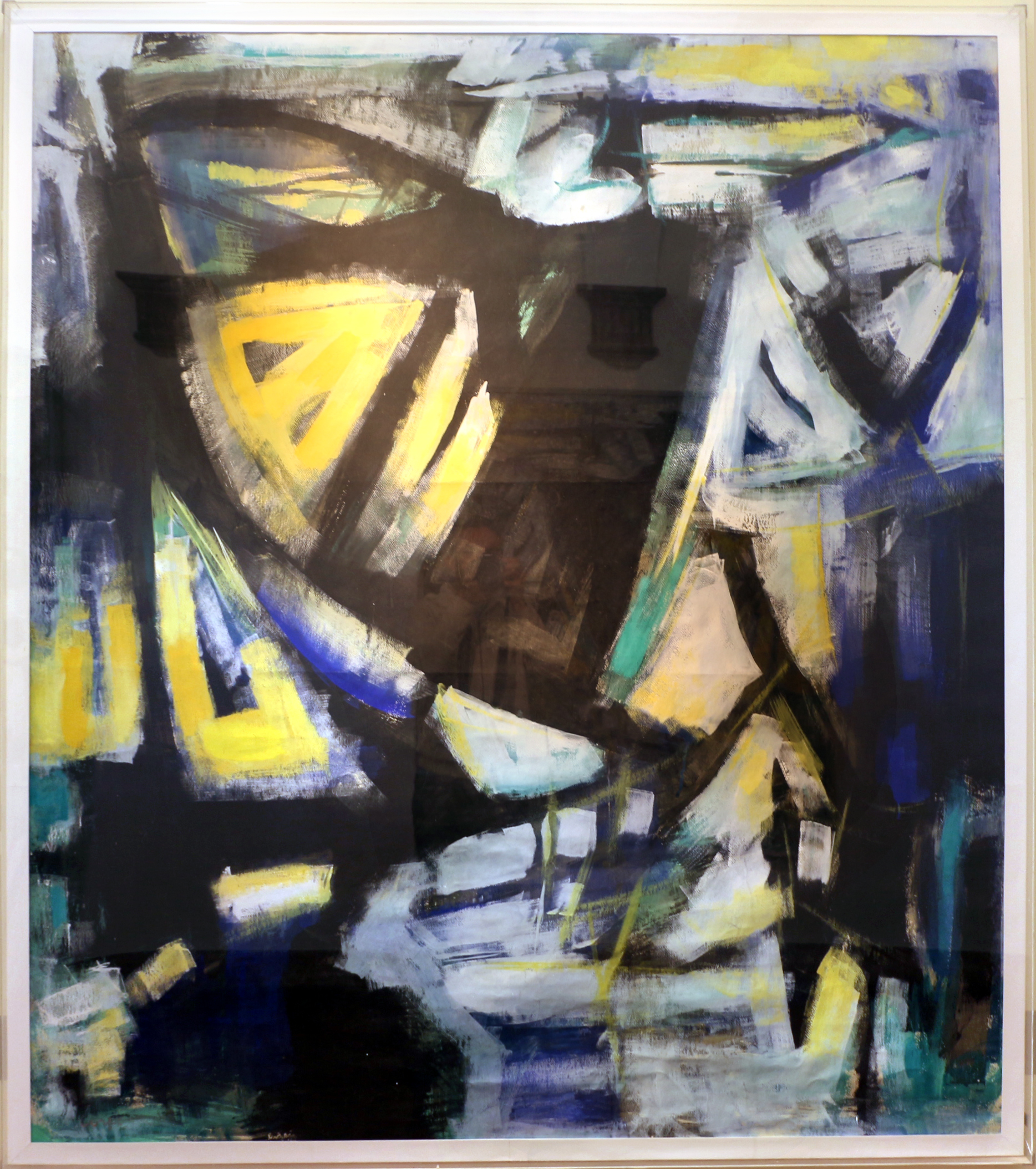 Collezione Mosaici Moderni - NB: Museum explicitly authorized the upload of its contemporary art collection for WLM 2016 (for further info ask WLM Italy organizators). This is a photo of a monument which is part of cultural heritage of Italy.